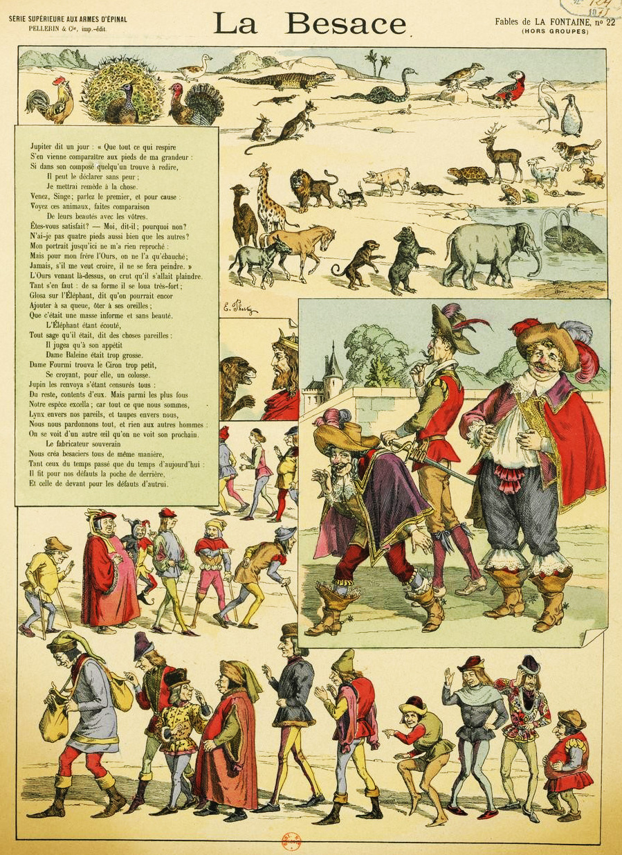 Estampe réalisée par E. Phosty représentant la fable La Besace de Jean de La Fontaine (Epinal, édition Pellerin & Cie, 1895).